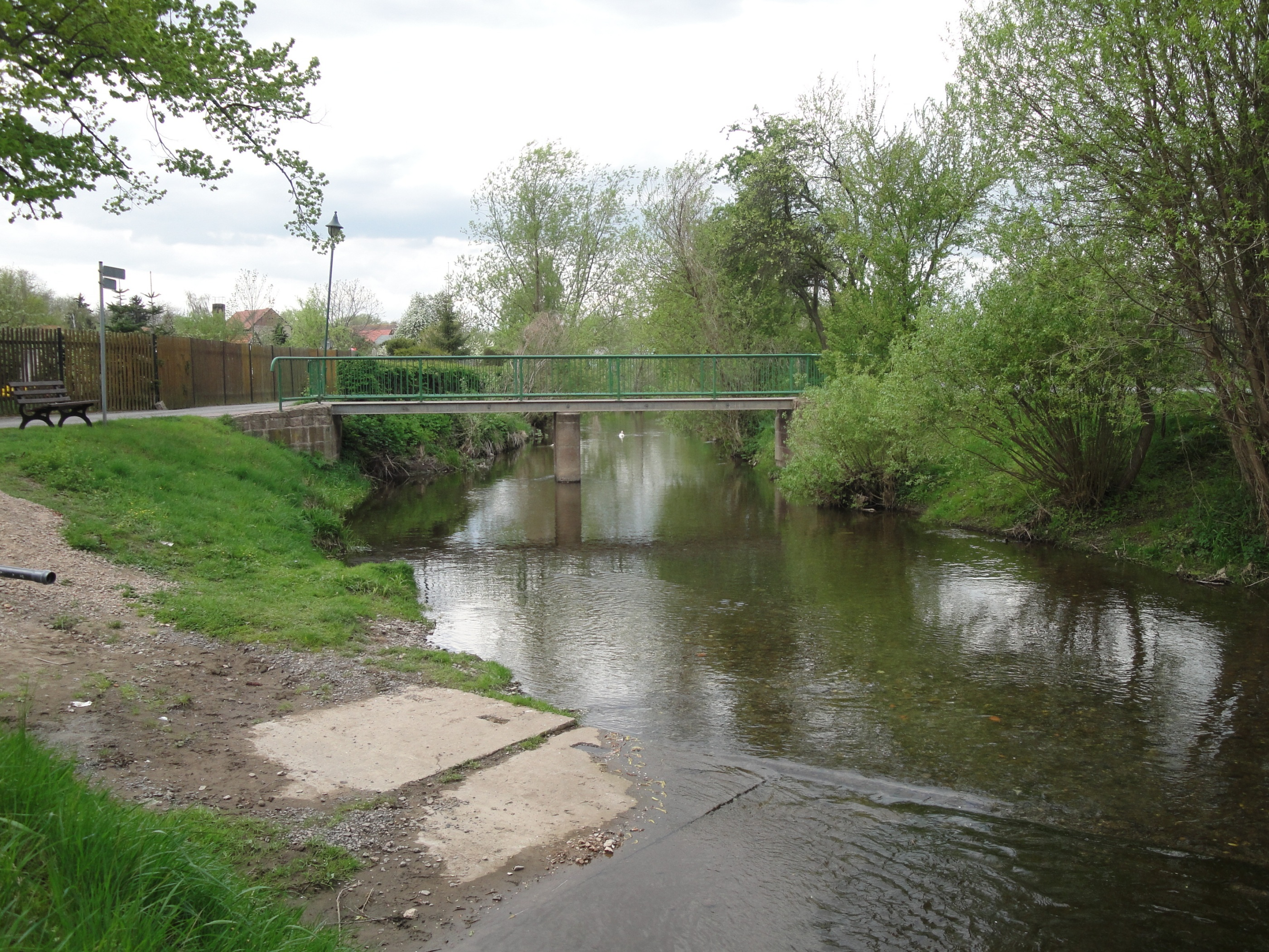 Brücke über die Thyra, Damm/Hinter den Ellern in 06536 Berga